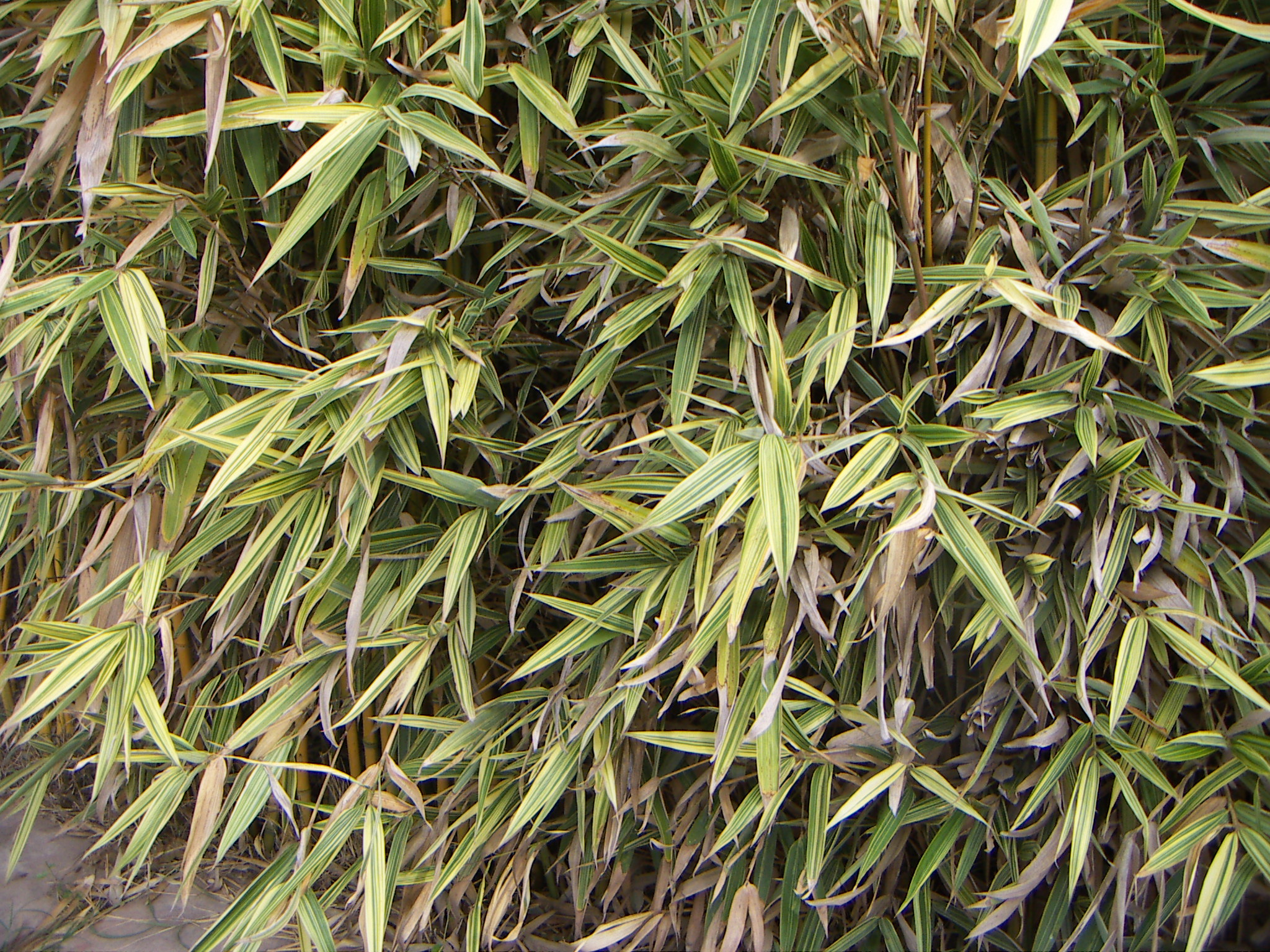 Hibanobambusa tranquillans var. shiroshima autor: Jordi Coll Costa 4 desembre del 2006